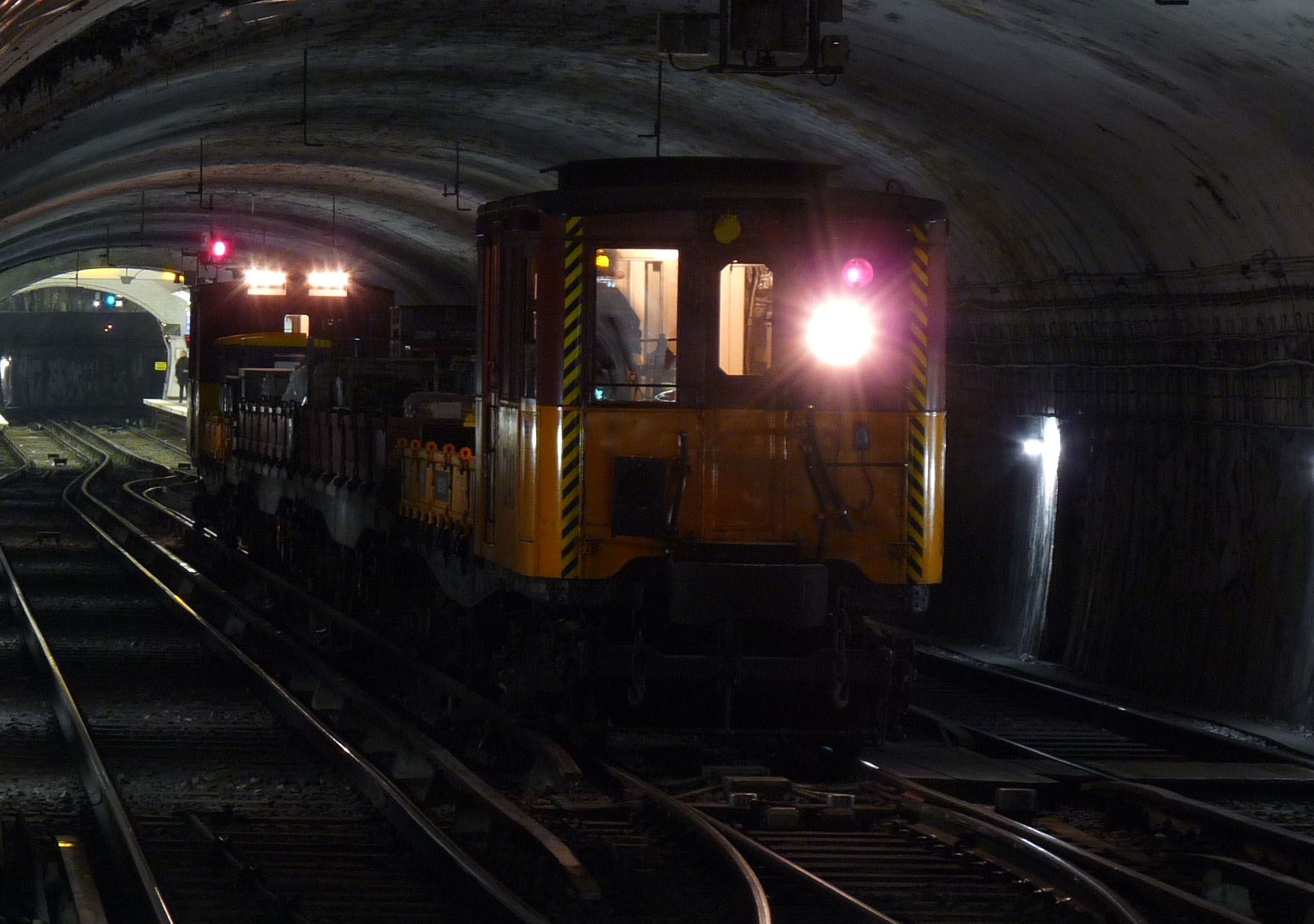 Le convoi d'Auteuil, encadré par deux tracteurs ex Nord-Sud T241 et T243 sur la voie centrale entre Maubert-Mutualité et Cluny-La-Sorbonne.